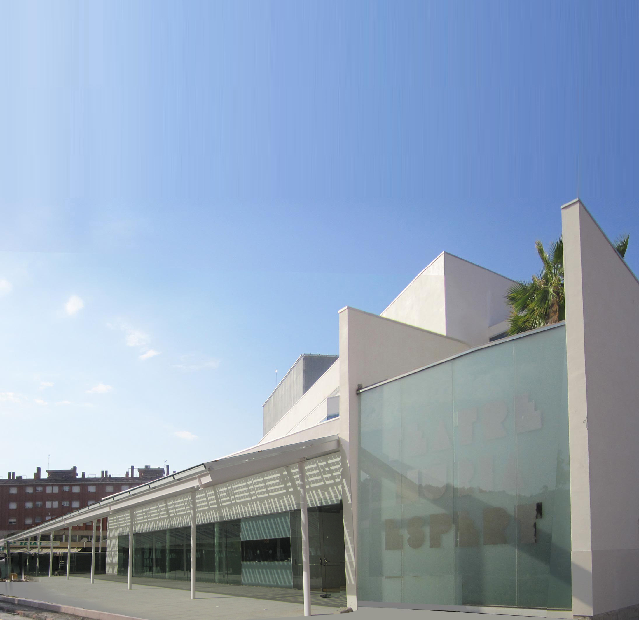 Vista exterior del Teatro Núria Espert de Sant Andreu de la Barca, Barcelona